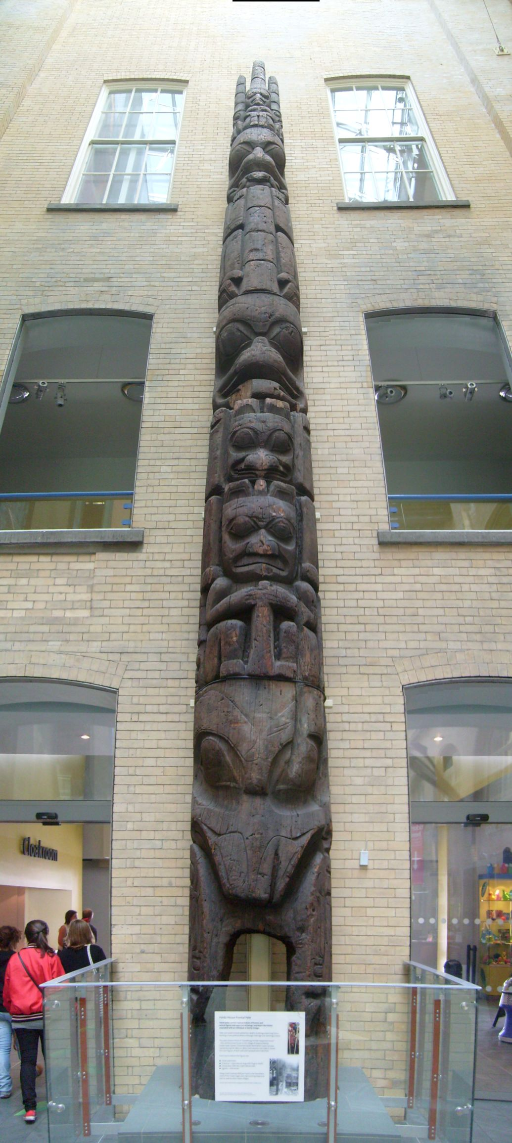 Haida House Frontal Pole, Liverpool Museum